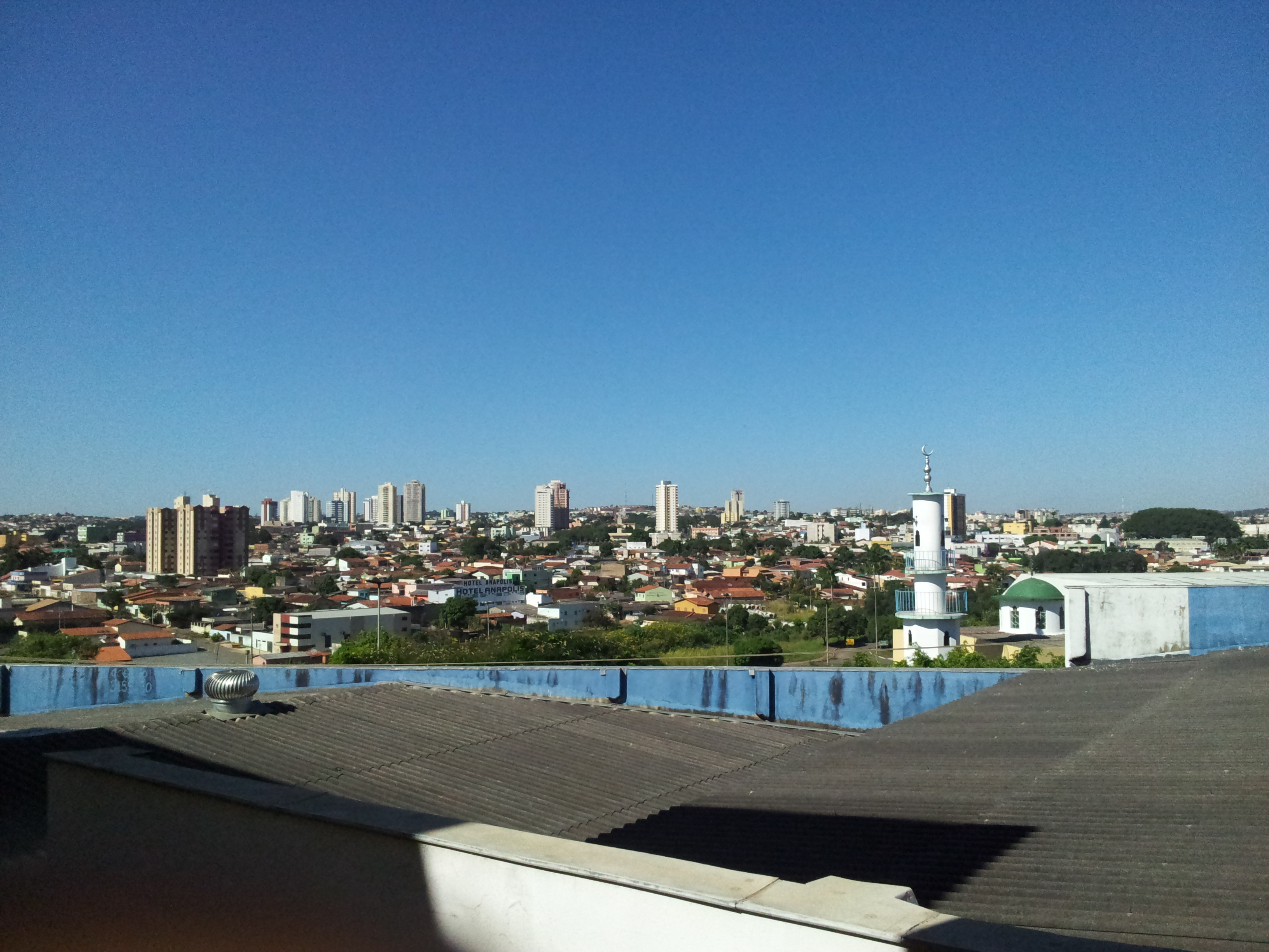 Anápolis